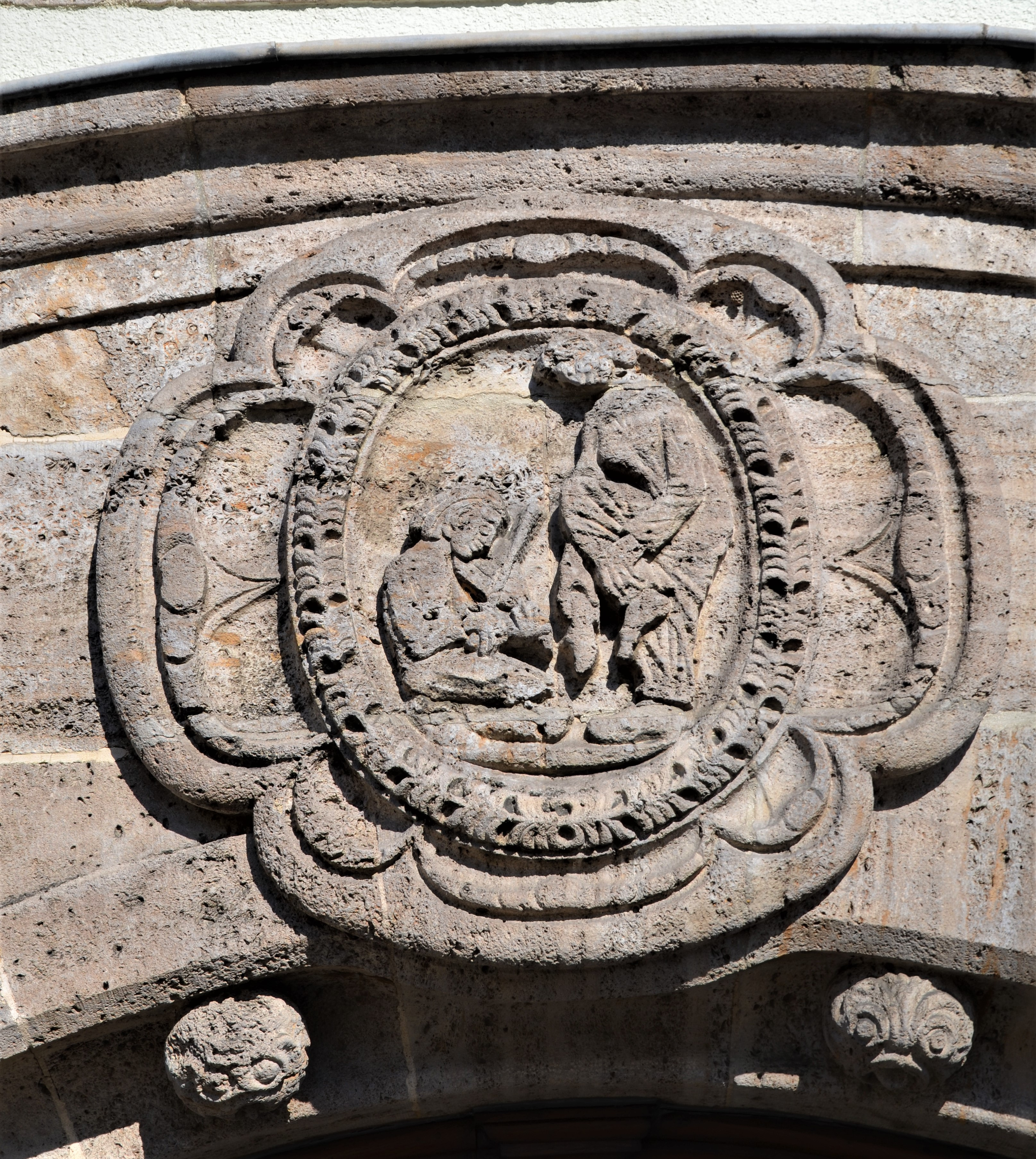 Relief an der Südfassade über dem Eigang an der HfG Schwäbisch Gmünd, Elseasserbau